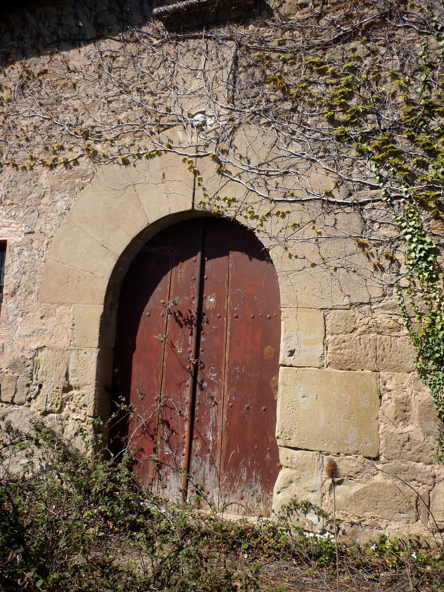 Masia de Garrigo (Clariana de Cardener): portal